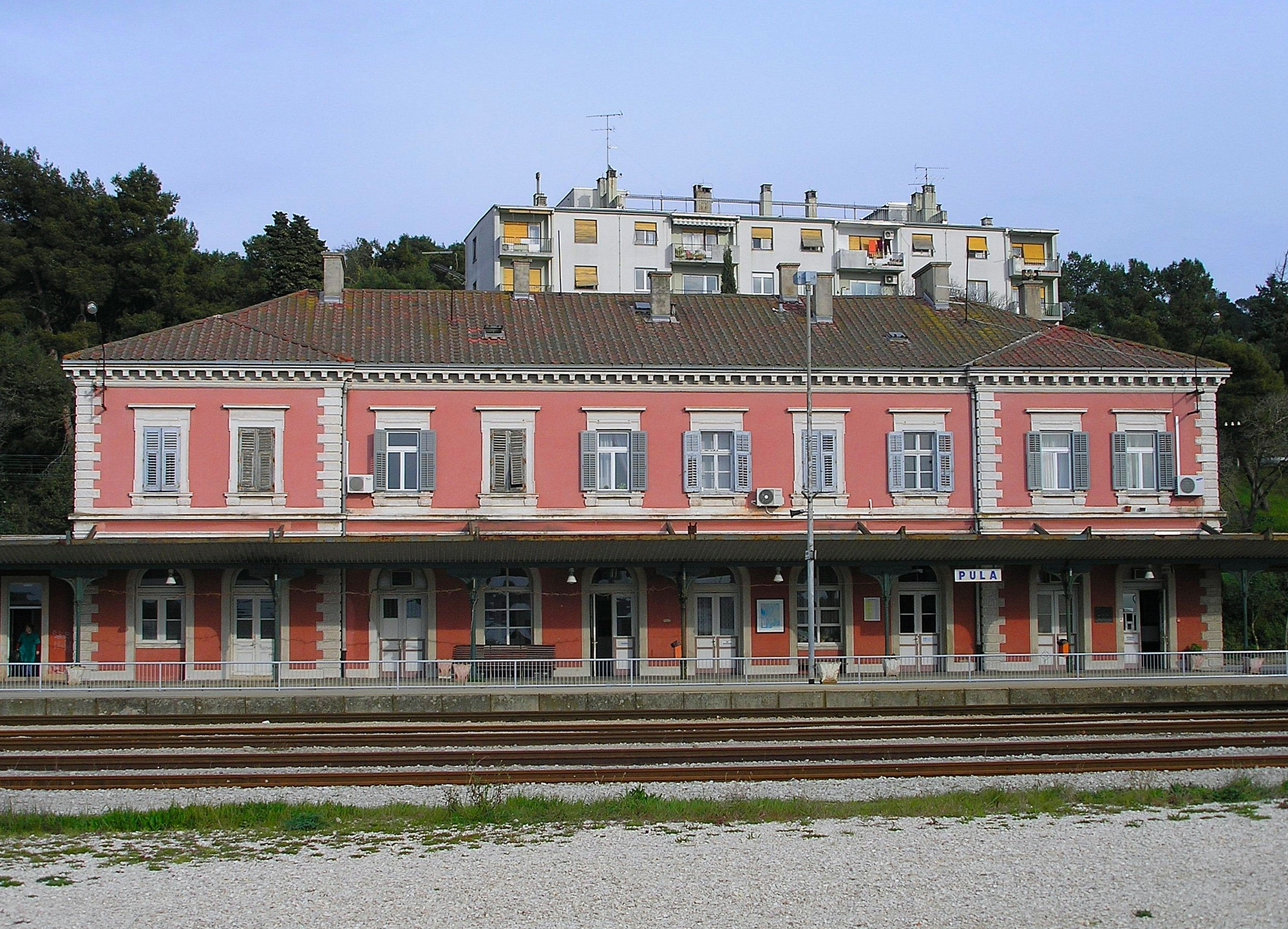 self-made